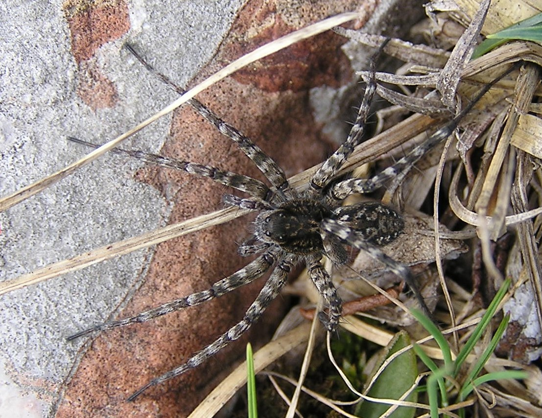 Acantholycosa lignaria auf dem Krippenstein (Dachsteinmassif, Österreich).